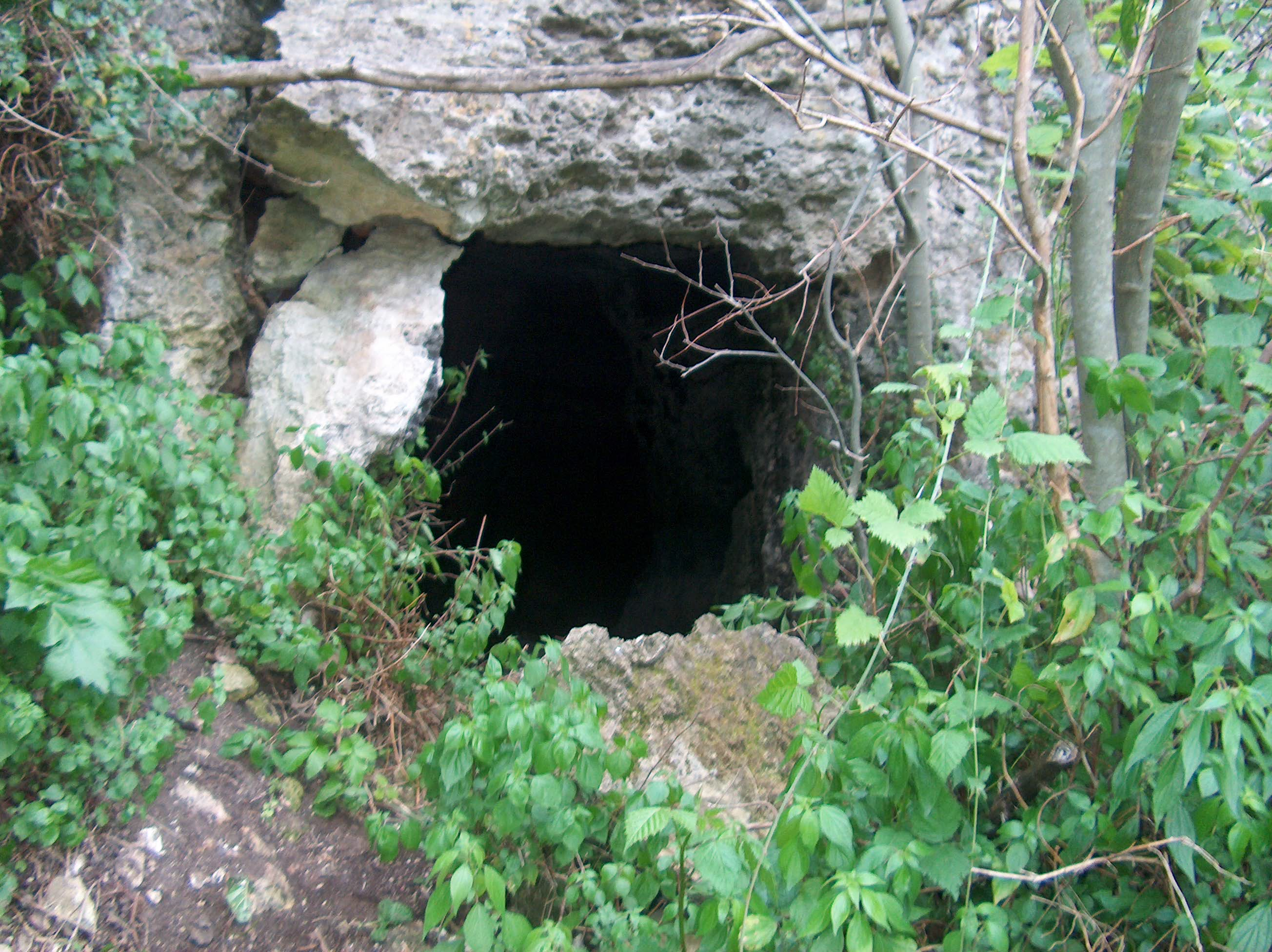 Tomba a forno al fiume mulinello Augusta(SR)